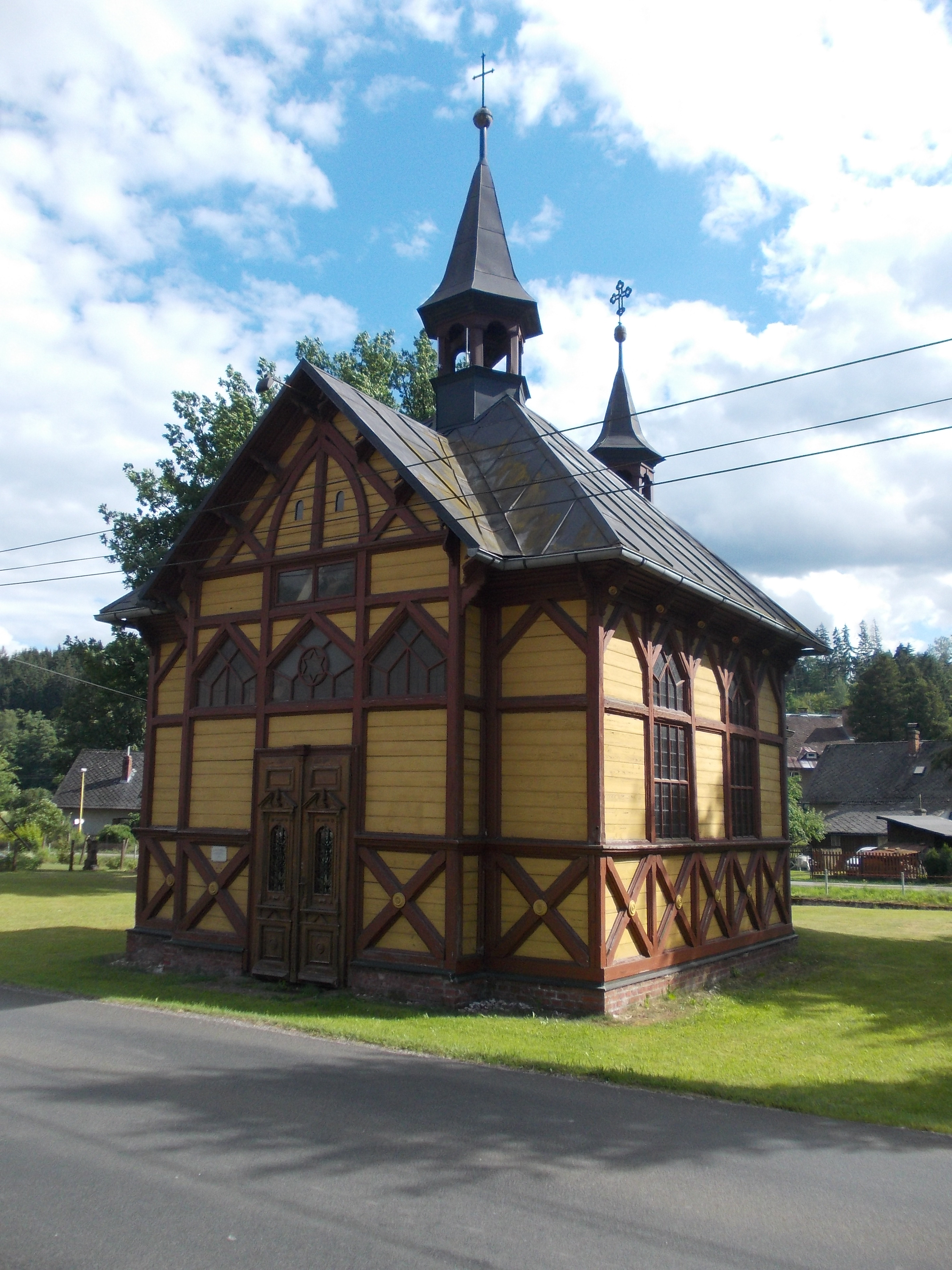 Klášterská Lhota - hrázděná kaple, pohled od severu